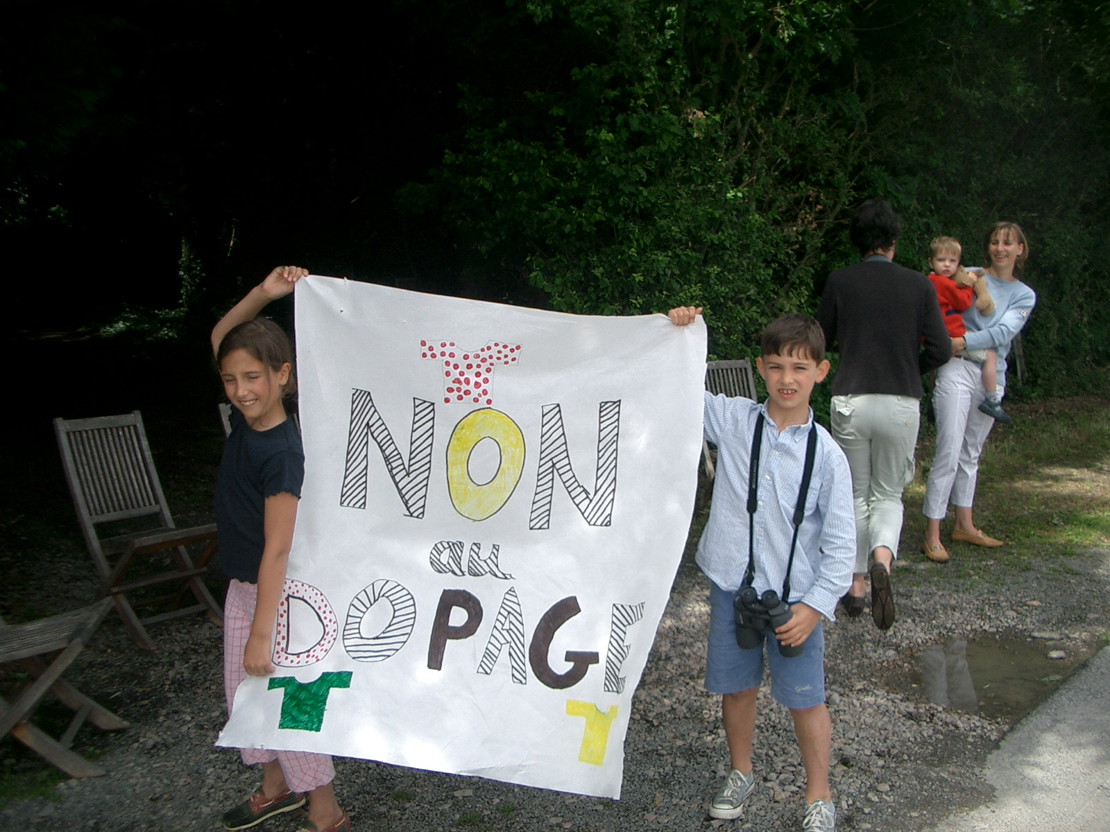 Tour de France 2004 - scandale du dopage